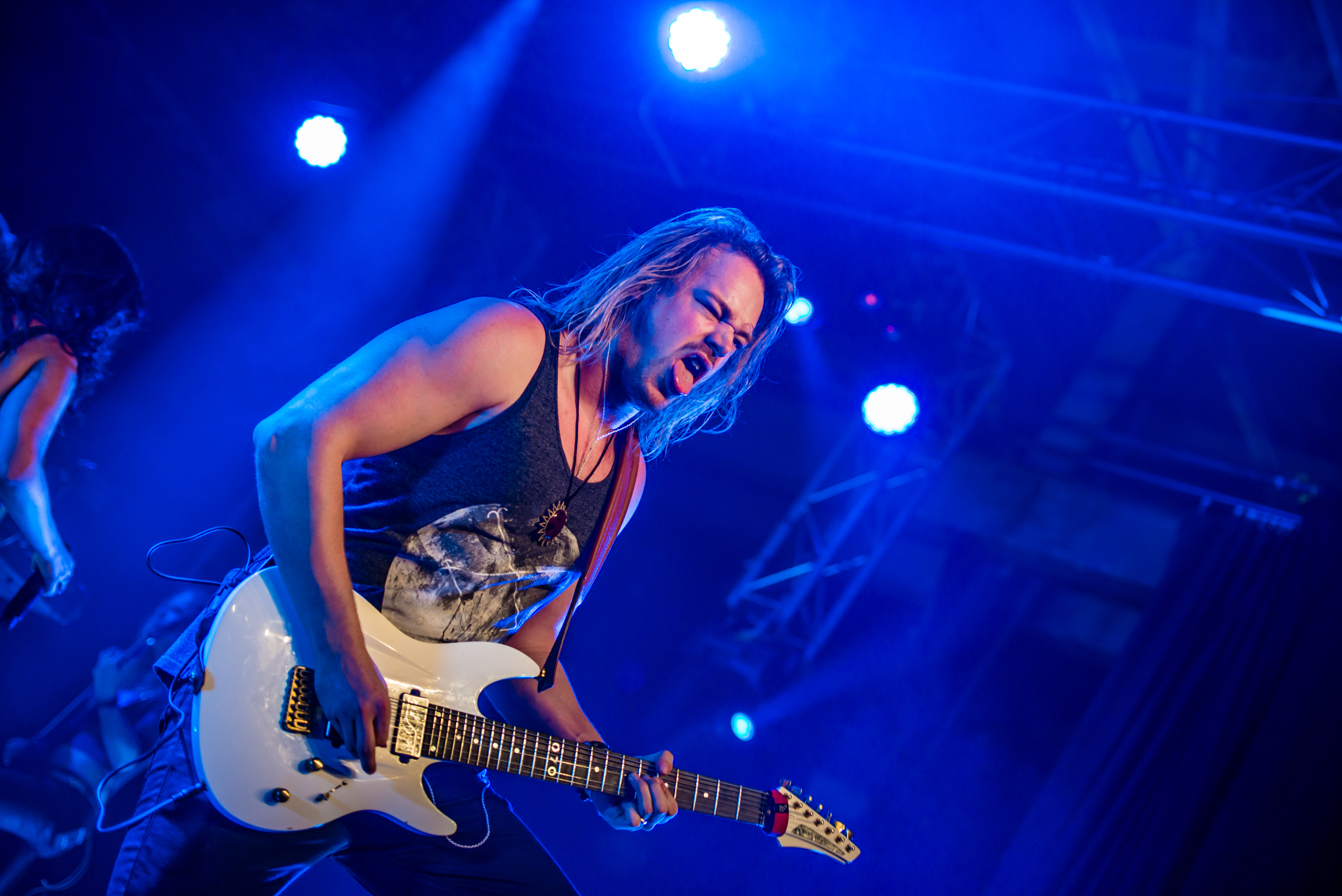 'Delain - Epic Metal Fest - Eindhoven'